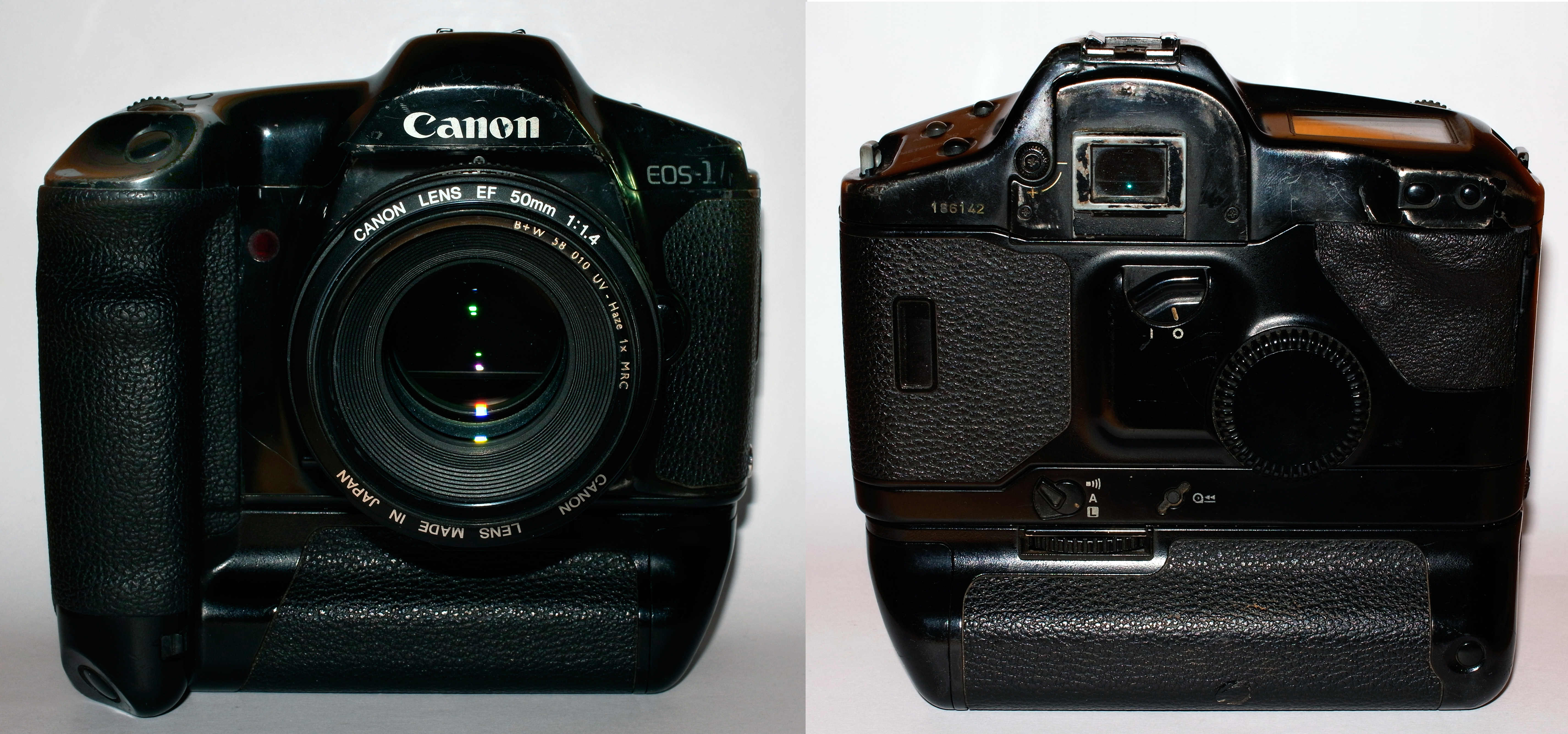 Canon EOS 1 mit 1.4/50mm Objektiv